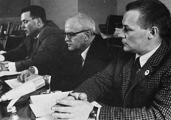 KFML presskonferens 1967